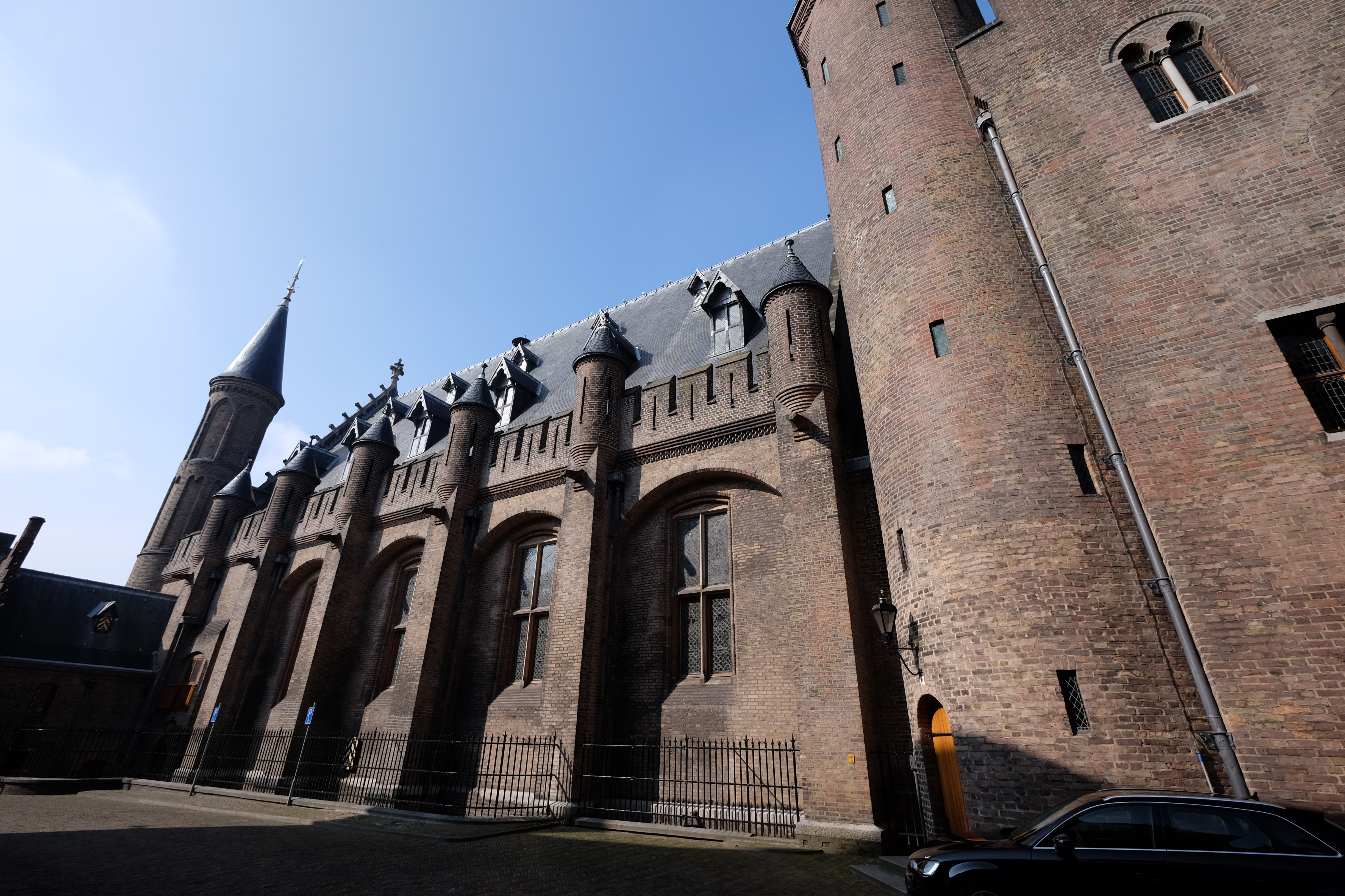 Het Binnenhof, Den Haag, Netherlands